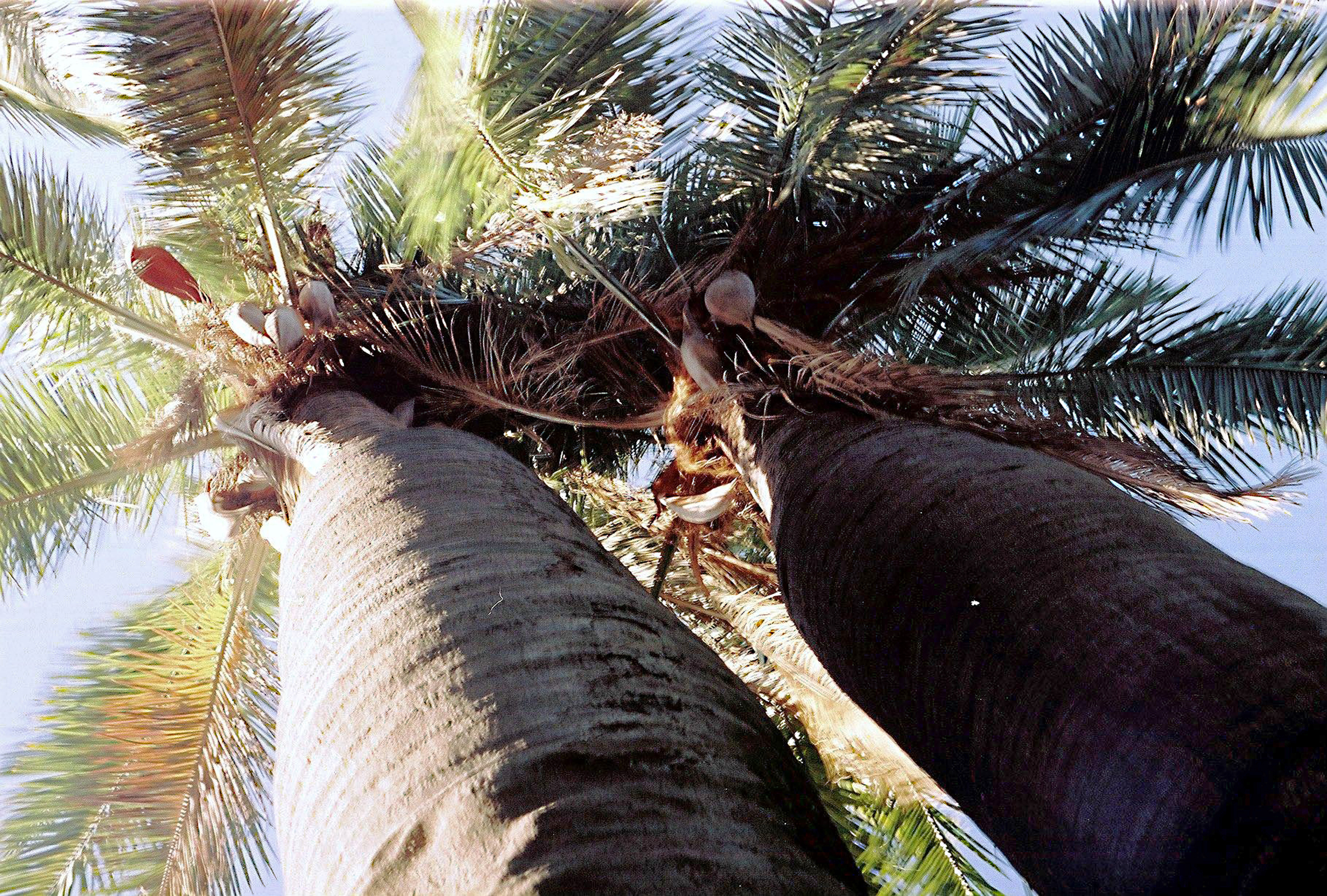 Parque Nacional La Campana - Region de Valparaiso La palma chilena, especie cuyo nombre científico es Jubaea chilensis, pertenece a la familia de las palmáceas, es la palma más austral del mundo y es endémica (nativa) de Chile. Se distribuye en forma natural entre La Serena y Talca, aproximadamente; encontrándose algunos ejemplares hasta la zona de Arauco. Se reconoce porque es la única palmera de tronco liso, además presenta un angostamiento a los ocho a diez metros de altura, que ocurre al llegar a la madurez. Su tronco es cilíndrico, de color grisáceo, cuya base tiene un diámetro variable entre 0,7 y 1 m; pudiendo llegar a medir hasta veinticinco metros de altura. Por definición, las palmas no son árboles, sus troncos no son de madera, ellos están compuestos de fibras. Por lo tanto, son hierbas gigantescas, como un tipo de pasto gigante, único en el mundo, muy sensible a la depredación y que hay que preservar. Entre las características más llamativas de la palma chilena está su lento crecimiento (llega al estado de madurez recién a los sesenta años) y su capacidad de resistir el fuego debido a componentes de su corteza, además, crece principalmente en las laderas de exposición norte de los cerros áridos.